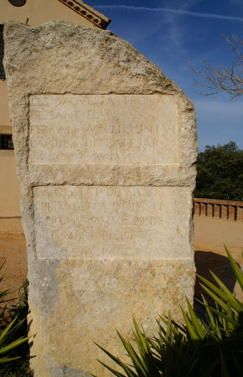 Pedra de recordança de Ferran Agulló A l'ermitatge de Sant-Elm (Sant Feliu de Guíxols)